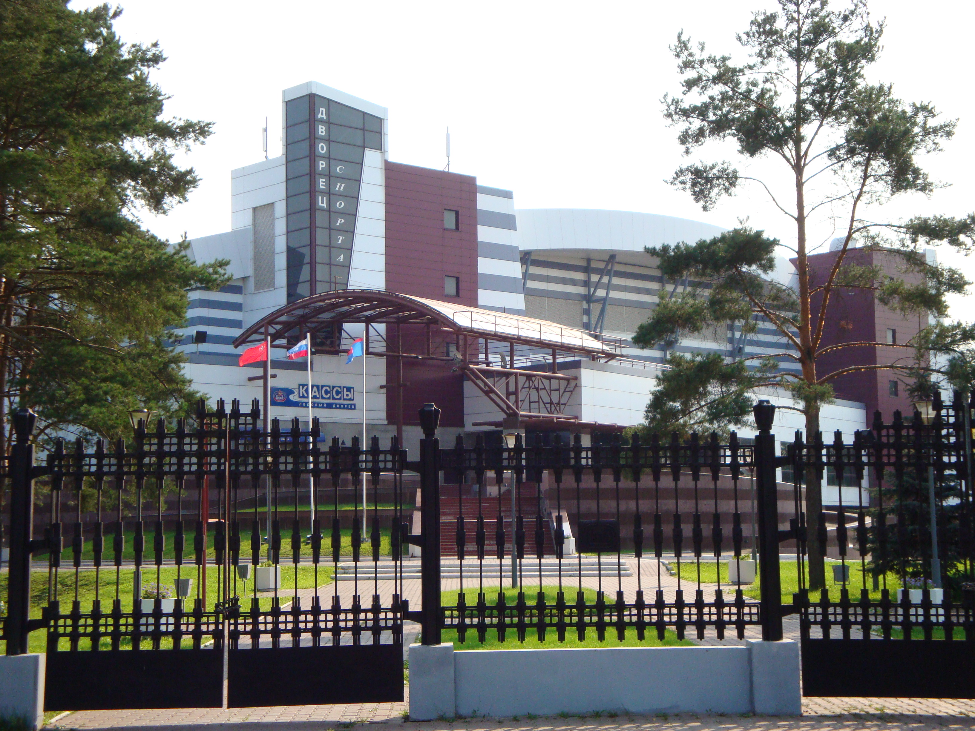 Дворец спорта "Витязь" в Подольске (Московская область)